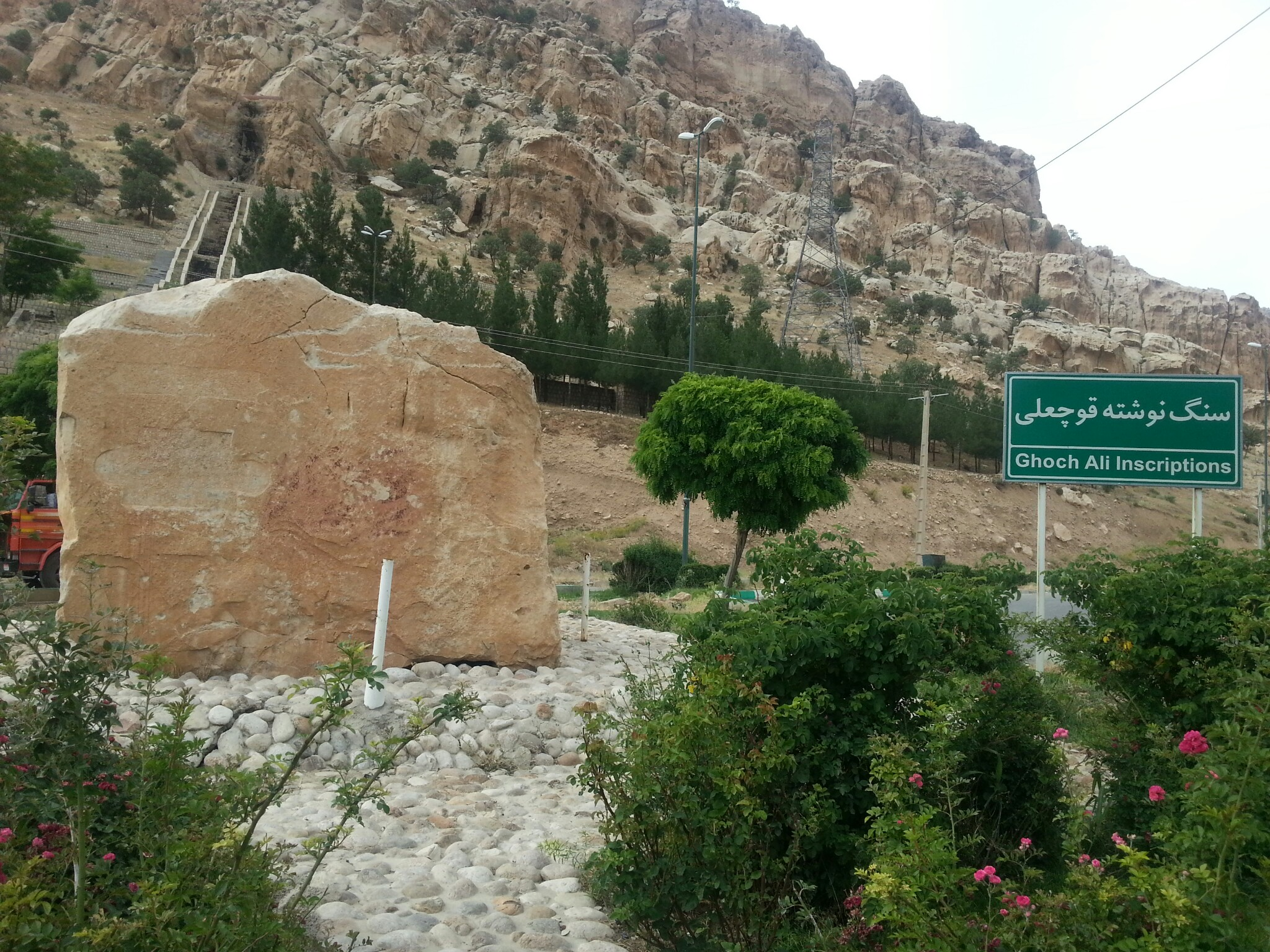 Ilam, Iran